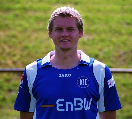 Bradley Carnell